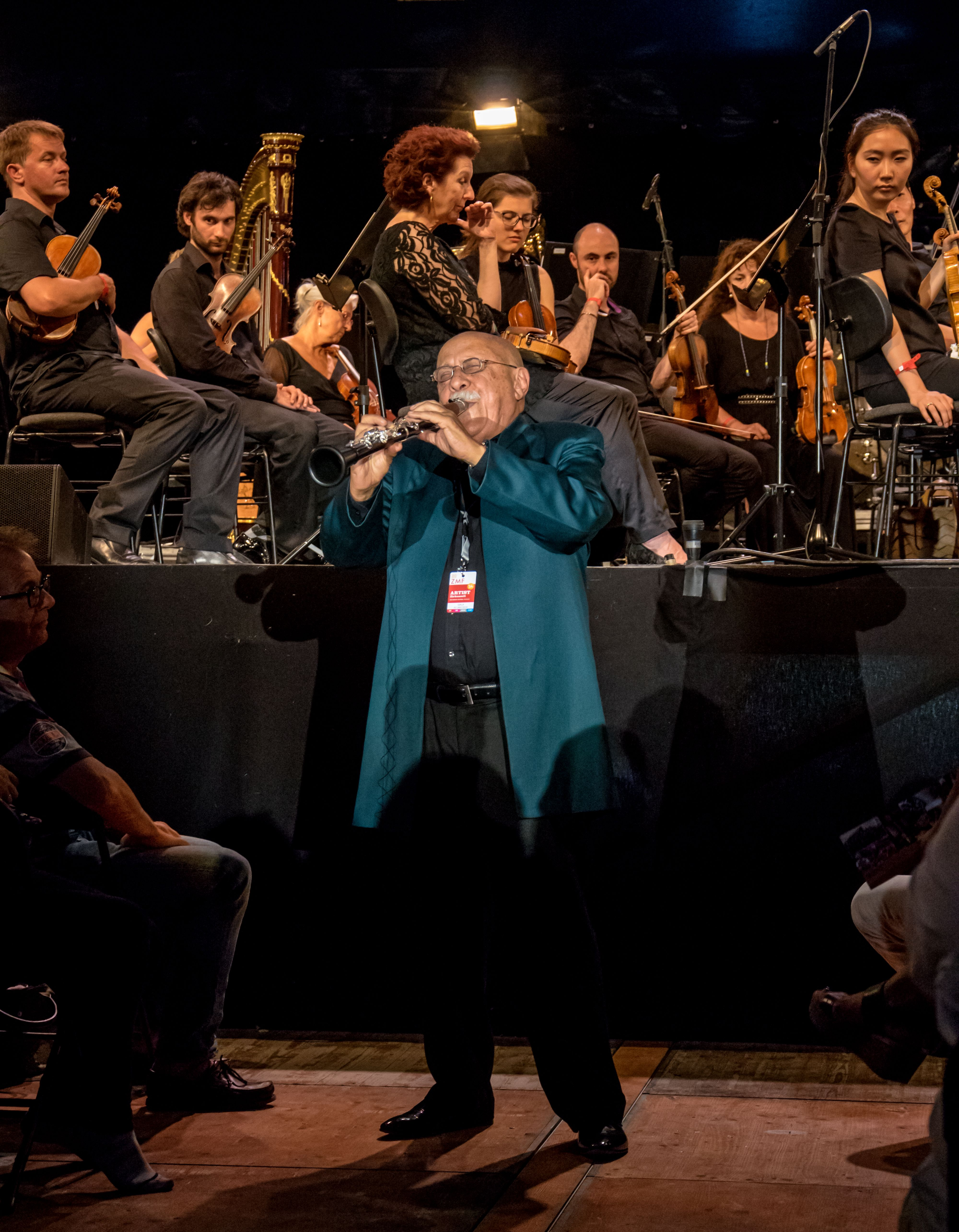 Bilder vom Zelt Musik Festival 2016 in Freiburg im Breisgau Die Gala